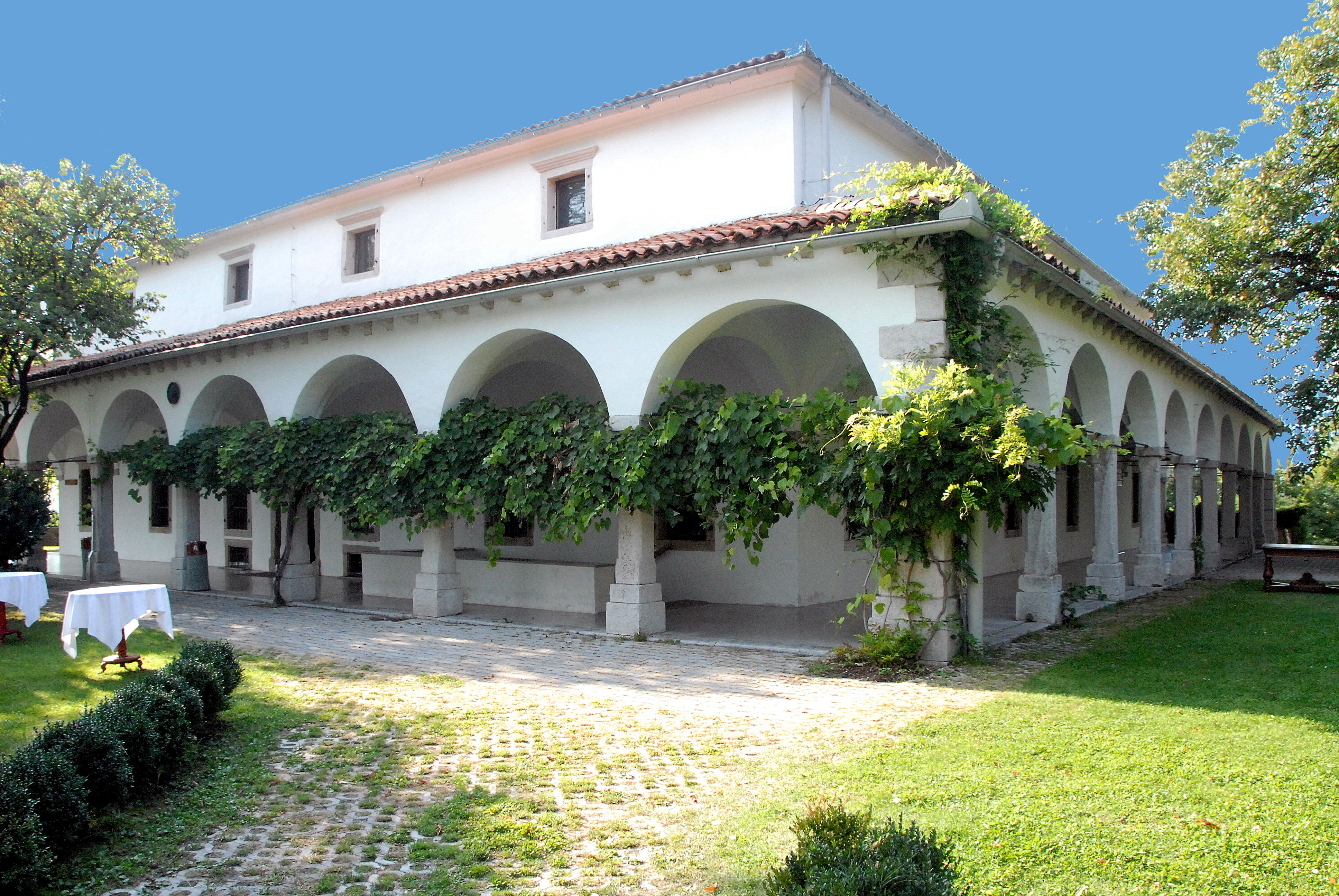 Hunting lodge “Zemono” near Vipava, Goriska, Slovenia